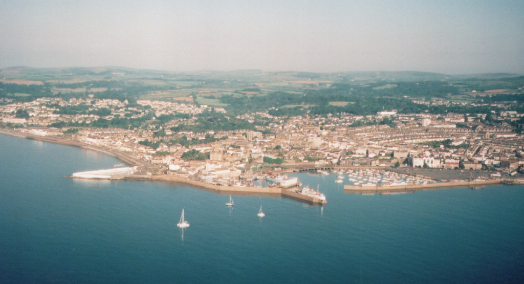 Pennsans, Pennwydh, Kernev. Gwel aerel. Pennsans, Pennwydh, Cernyw. Fel y gwelir mewn hofrennydd. Penzance, Penwith, Cornwall. As seen from the helicopter. Pennsans, Pennwydh, Kernow. Gwel askell-dro.